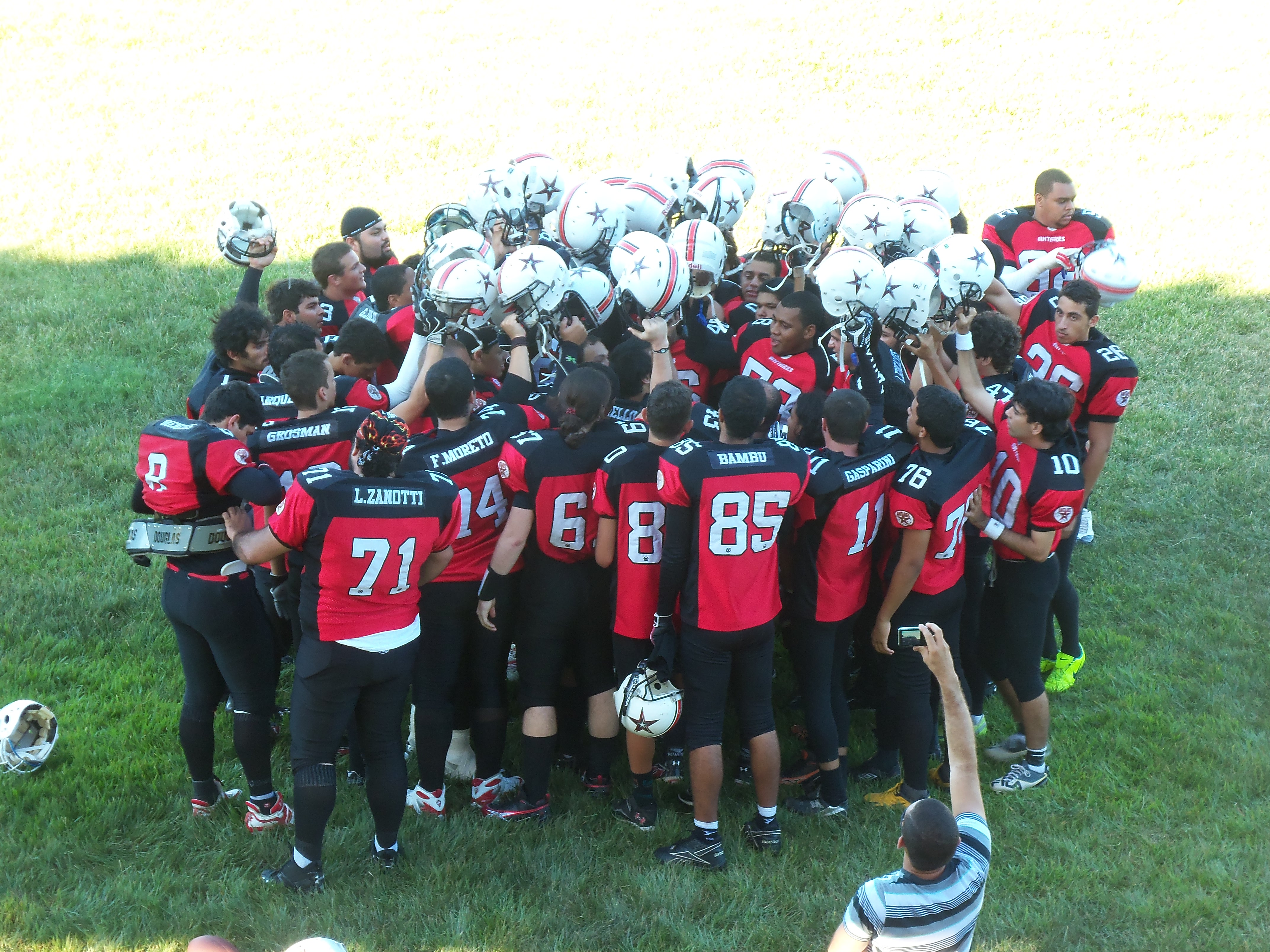 Antares FA antes da abertura do Campeonato Capixaba de Futebol Americano de 2012.